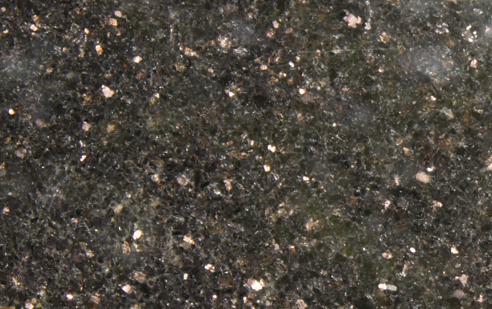 Star Galaxy, Gabbro (Muster 7x12cm) Unknown